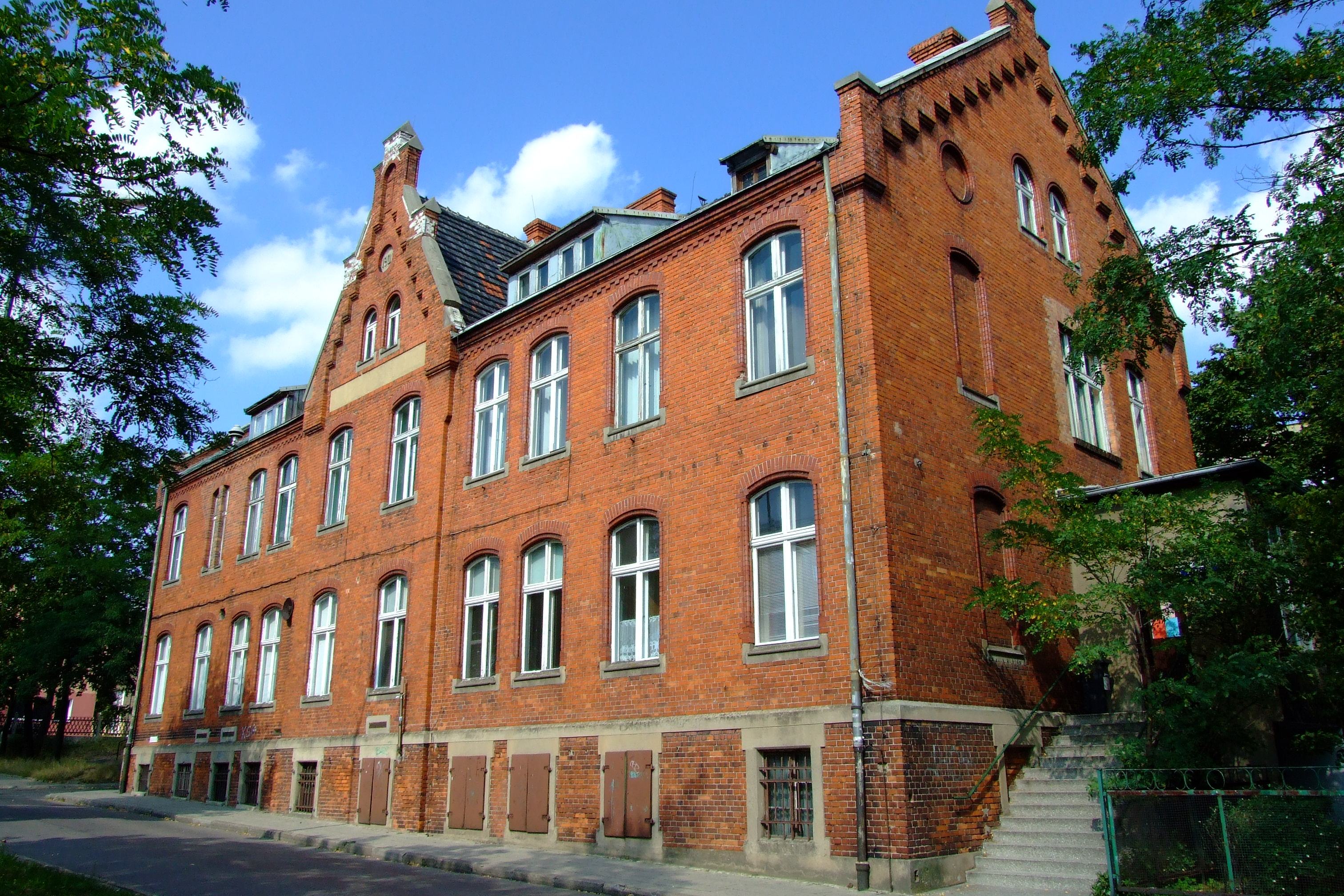 Budynek starego szpitala w Pyskowicach